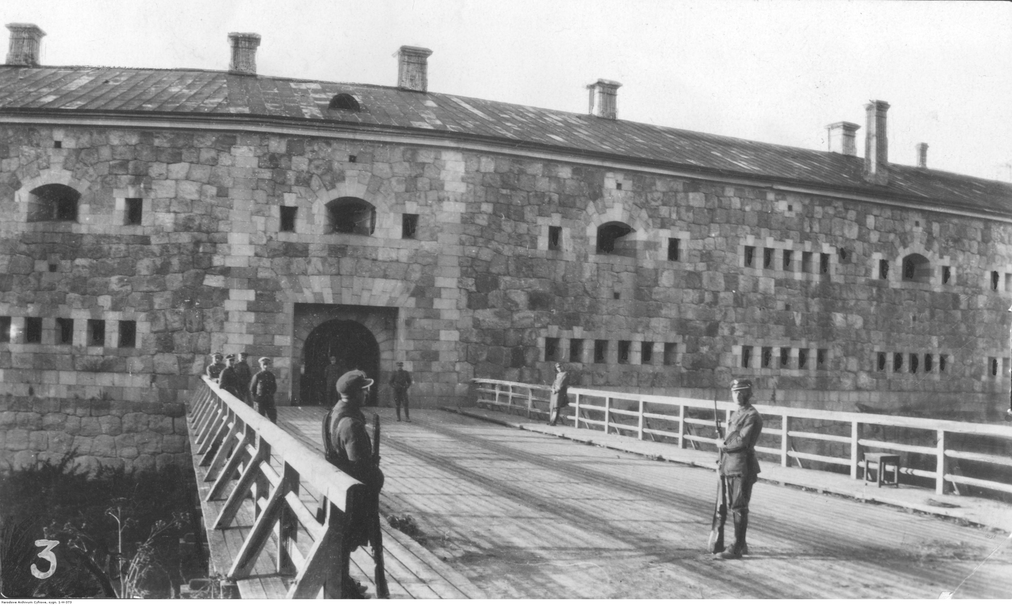 Wojna polsko-radziecka. Warta polska w forcie dźwińskim po jego zdobyciu; 1920. Widoczny fragment zewnętrznej elewacji budowli oraz most prowadzący do bramy twierdzy. Koncern Ilustrowany Kurier Codzienny - Archiwum Ilustracji. Sygnatura: 1-H-373